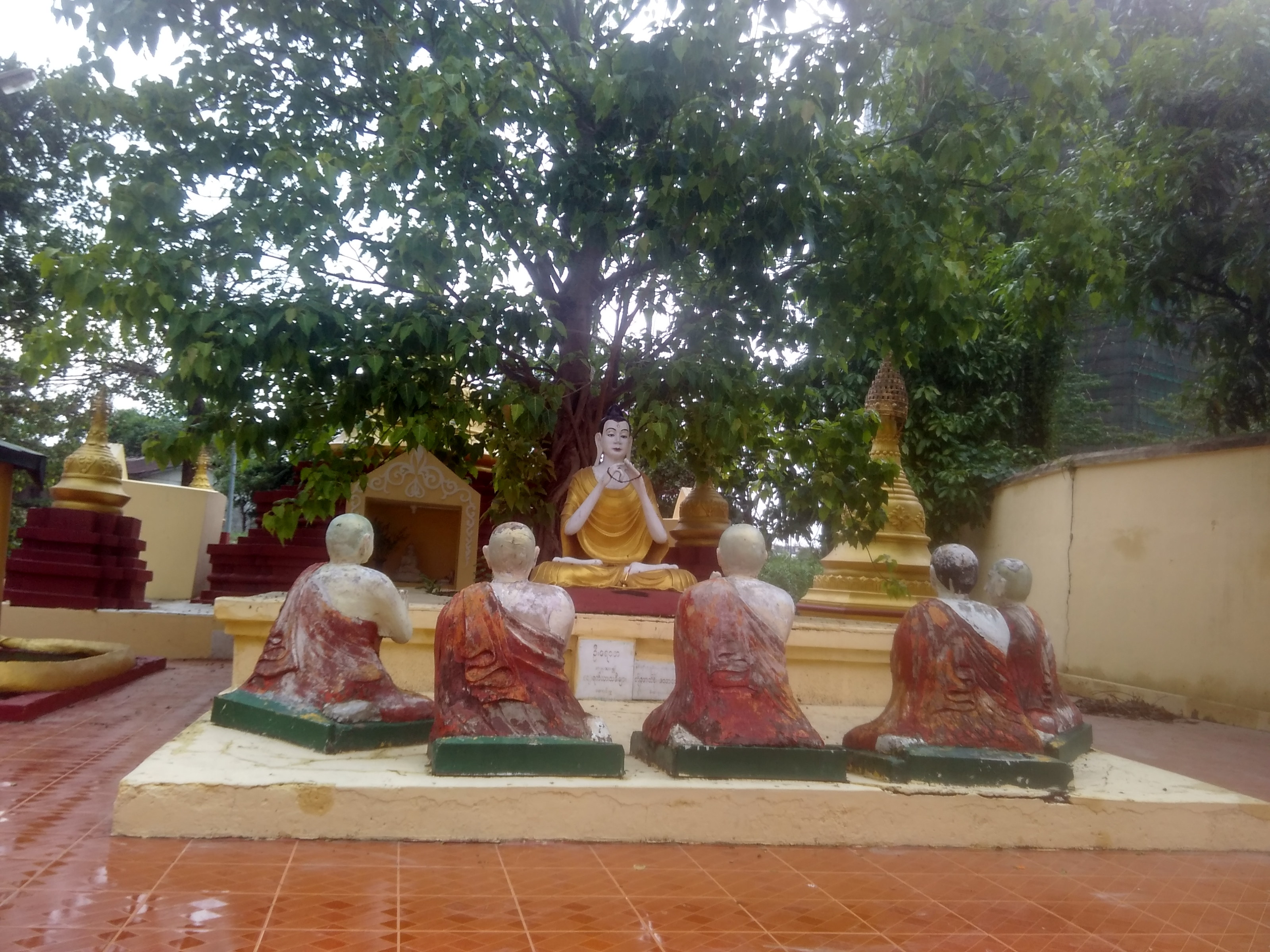 မြန်မာဘာသာ: ဓမ္မစကြာတရားတော် ဟောကြားနေပုံ ဖြစ်သည်။ ၂၀၁၈ ခုနှစ်၊ မေလ ၃၀ ရက်နေ့တွင် ရိုက်ကူးခဲ့သည်။ ဤတရားဦးဟောကြားနေပုံကို ရန်ကုန်တိုင်းဒေသကြီး၊ တာမွေမြို့နယ်၊ မေတ္တာညွန့်ရပ်ကွက်၊ စက်မှု (၅) လမ်းရှိ တြိရတနပရိယတ္တိစာသင်တိုက်မှ ရုပ်ပုံရိုက်ယူခဲ့သည်။